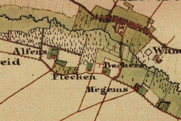 Preußische Kartenaufnahme 1846 - Uraufnahme